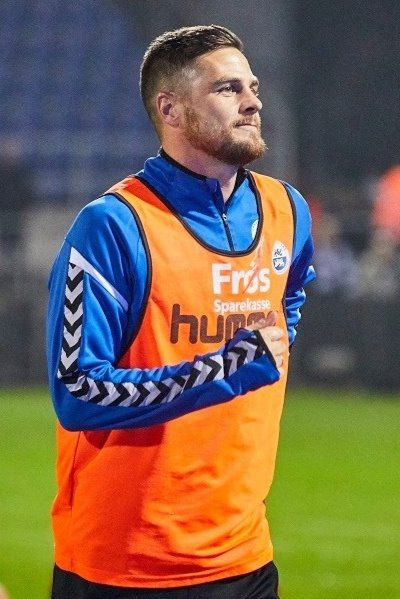 Anders Egholm I sønderjyske, efter en kamp